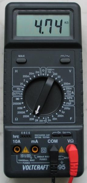 Digitalmultimeter Voltcraft 4095 bei der Widerstandsmessung